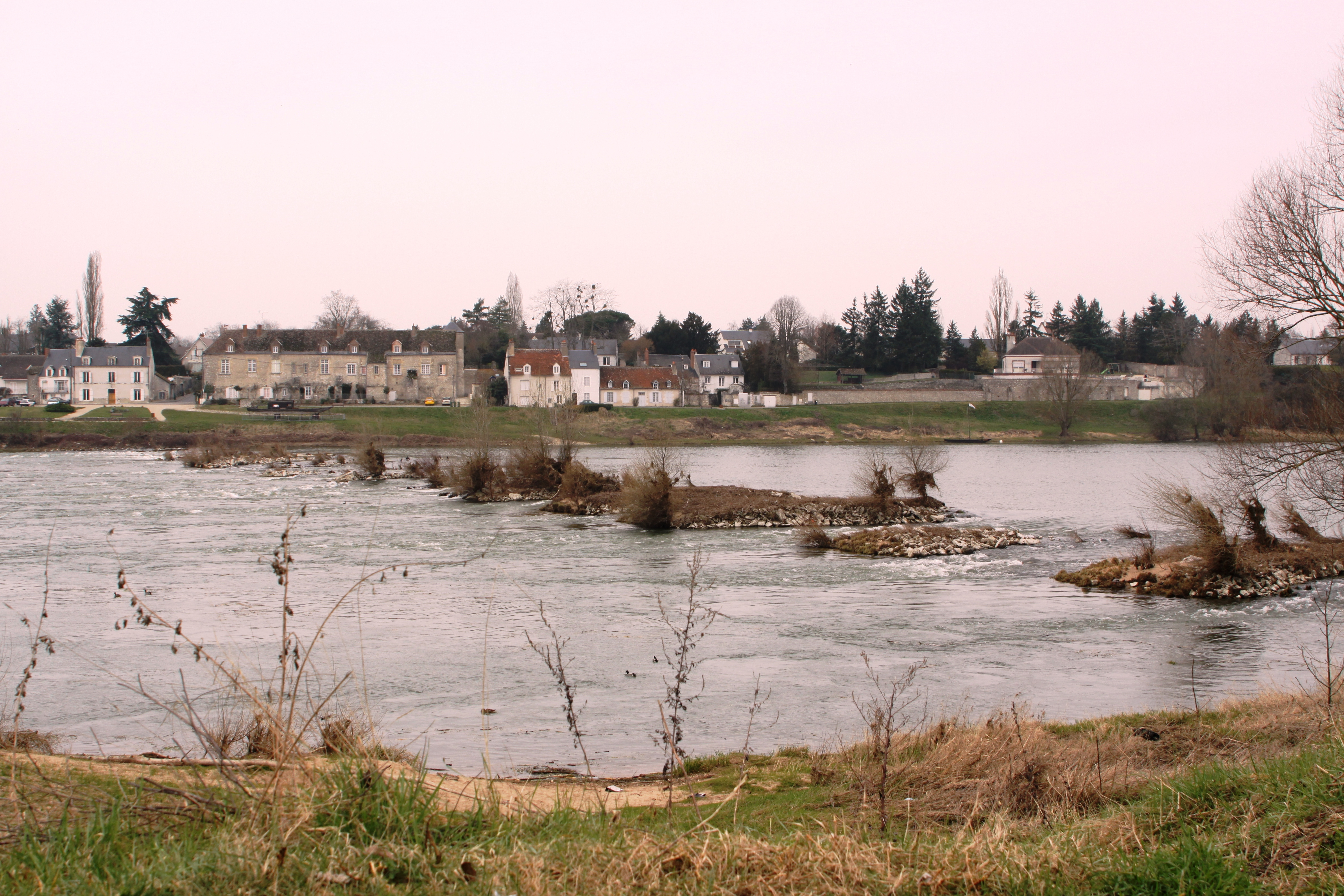 Les restes de piliers du vieux pont jadis conquis par Jeanne d'Arc